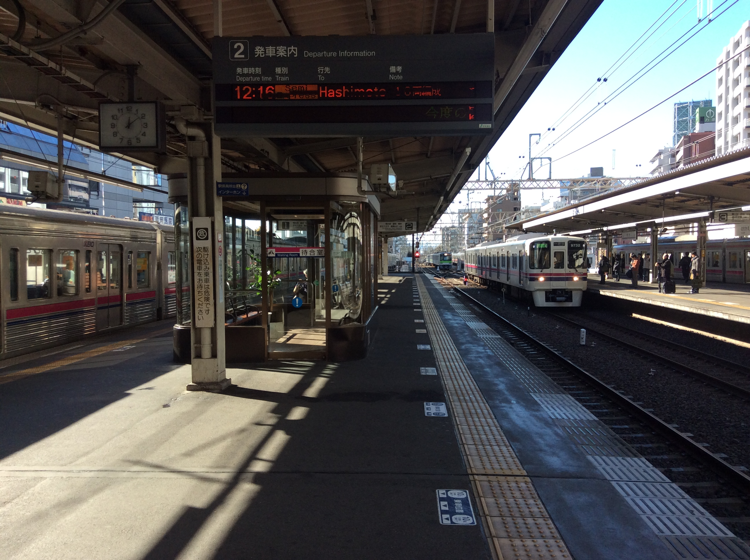 2014年（平成26年12月）13日、